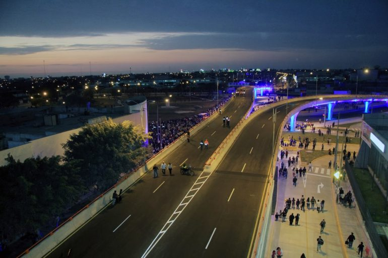 Bypass en Avenida Mansiche.